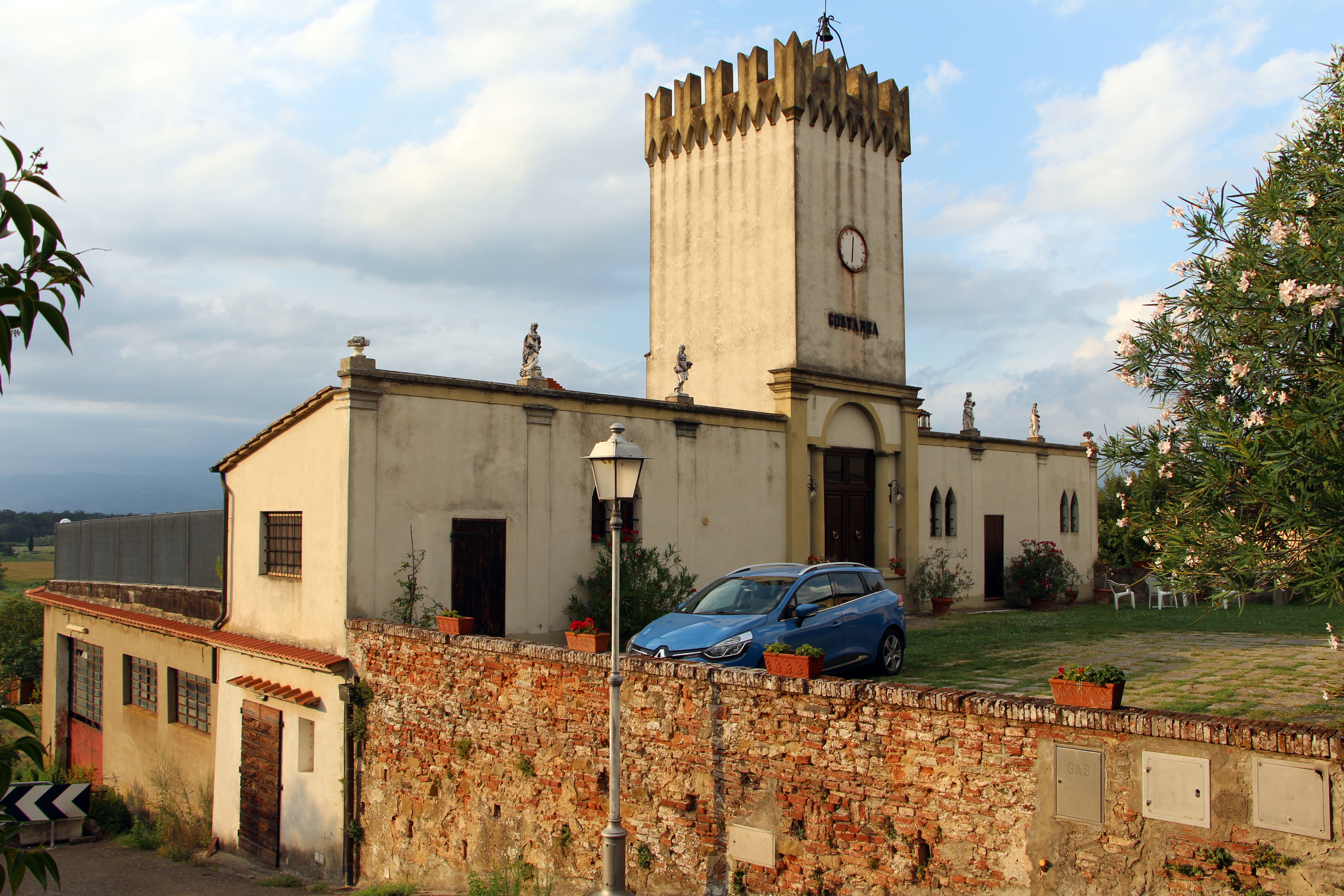 Cerreto Guidi The making of this document was supported by Wikimedia CH. (Submit your project!) For all the files concerned, please see the category Supported by Wikimedia CH.